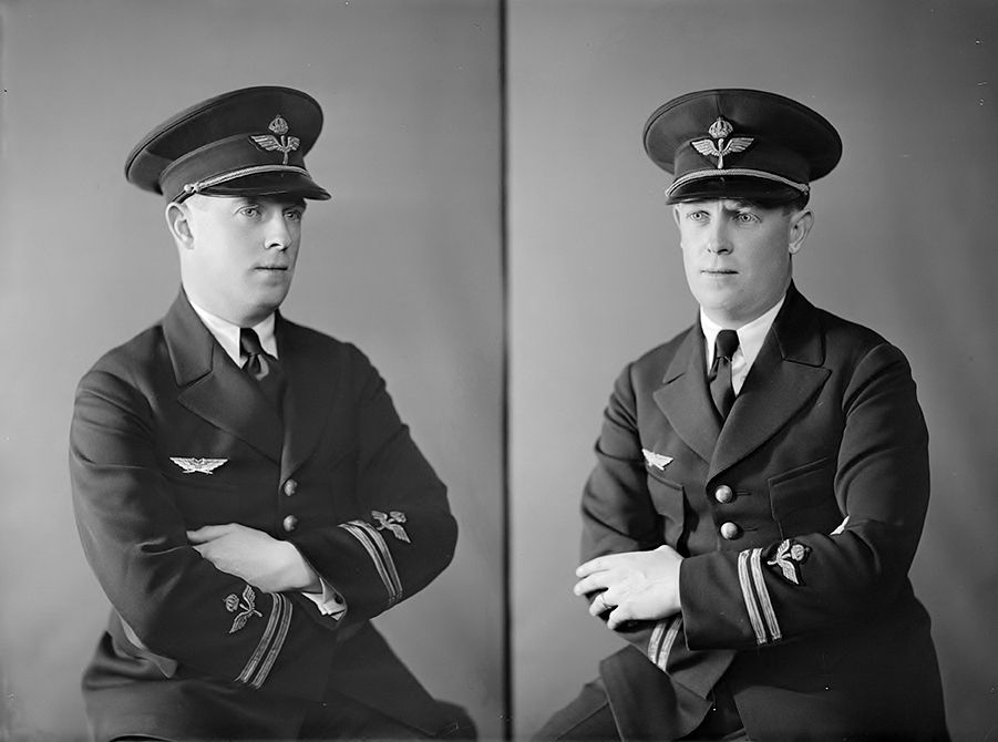 Motiv: Porträtt av löjtnant Folke Ripa, militär flygförare och flygspanare. 2 bilder. Tillhör Gamla Malmen-samlingen. GM 1130. Ur Flygvapenmuseums bildarkiv.